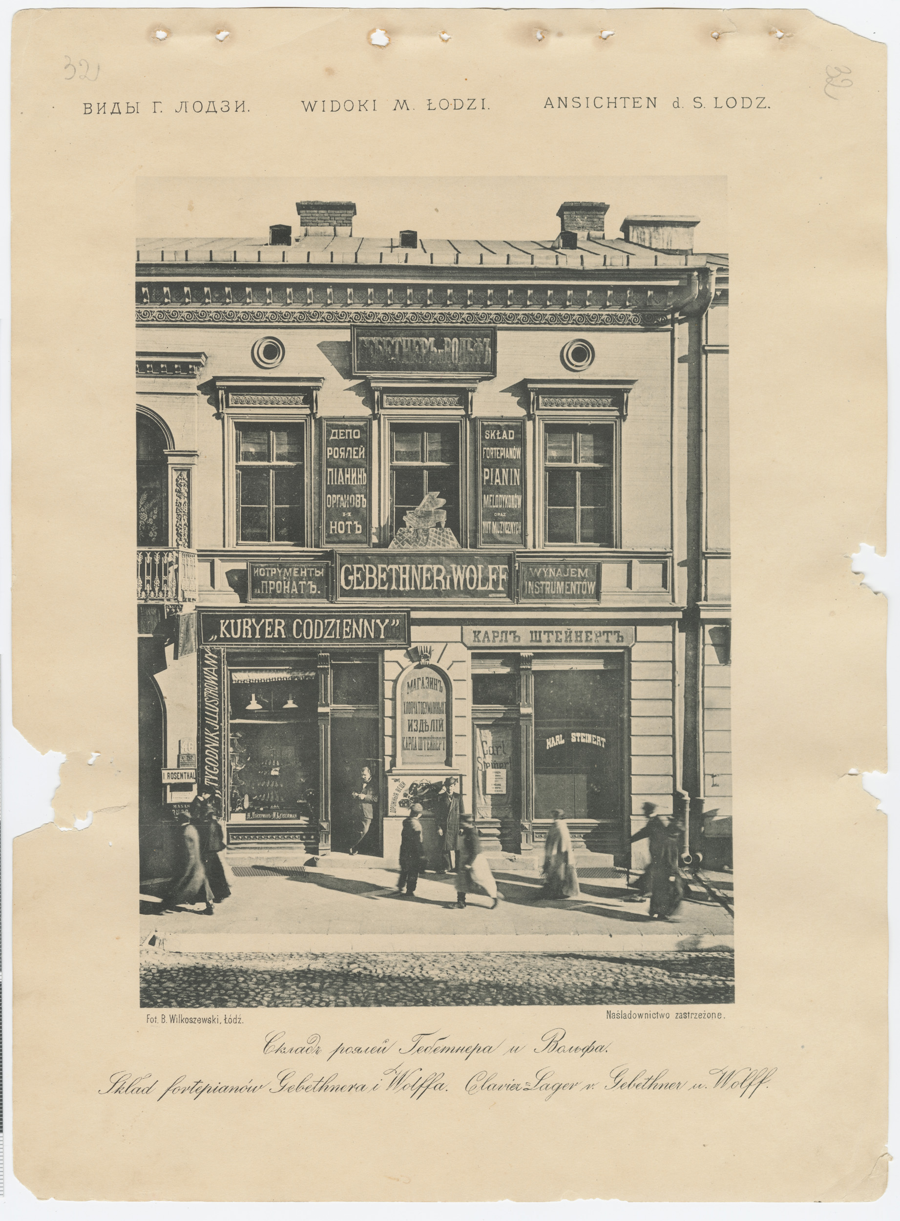 Fotografia przedstawia kamienicę znajdującą się pod adresem Piotrkowska 18. Od połowy lat 70. XIX wieku mieściła się tu drukarnia „Lodzer Zeitung” Jana Petersilge (właściciela najstarszej łódzkiej oficyny drukarskiej). "Lodzer Zeitung" było pierwszym czasopismem wydawanym w Łodzi, w języku niemieckim. Przez 3 miesiące 1881 roku przy Piotrkowskiej 18 działała również redakcja „Gazety Łódzkiej”, dodatku do „Lodzer Zeitung”. Redagował ją prawnik Wiktor Piątkowski. W sierpniu 1885 roku, rozpoczął tu działalność inny drukarz - Leon Krukowski. Prowadził on wcześniej firmę przy Cegielnianej (później Więckowskiego 8), gdzie od 1884 roku drukował "Dziennik Łódzki", pierwszą niezależną łódzką gazetę w języku polskim. W1890 roku Gustaw Gebethner otworzył tutaj skład nut i fortepianów – późniejsza firma „Gebethner i Wolff”. W latach późniejszych znany sklep „Gebethner i Wolff” funkcjonował przy Piotrkowskiej 48. Przed I wojną światową przy Piotrkowskiej 18 mieścił się hotel „Metropol”. Fotografia pochodzi z wydanego w 1896 roku albumu Bronisława Wilkoszewskiego „Widoki m. Łodzi”. Saryusz Bronisław Paweł Wilkoszewski (1847-1901), zwany "łódzkim Canaletto" był mistrzem fotografii ilustracyjnej. Udokumentował zabudowę Łodzi z końca XIX wieku przede wszystkim wille, fabryki, budynki użyteczności publicznej, obiekty sakralne, ulicę Piotrkowską. Jego zakład fotograficzny znajdował się w willi "Trianon" w Pasażu Meyera 5 (obecnie ulica Moniuszki).